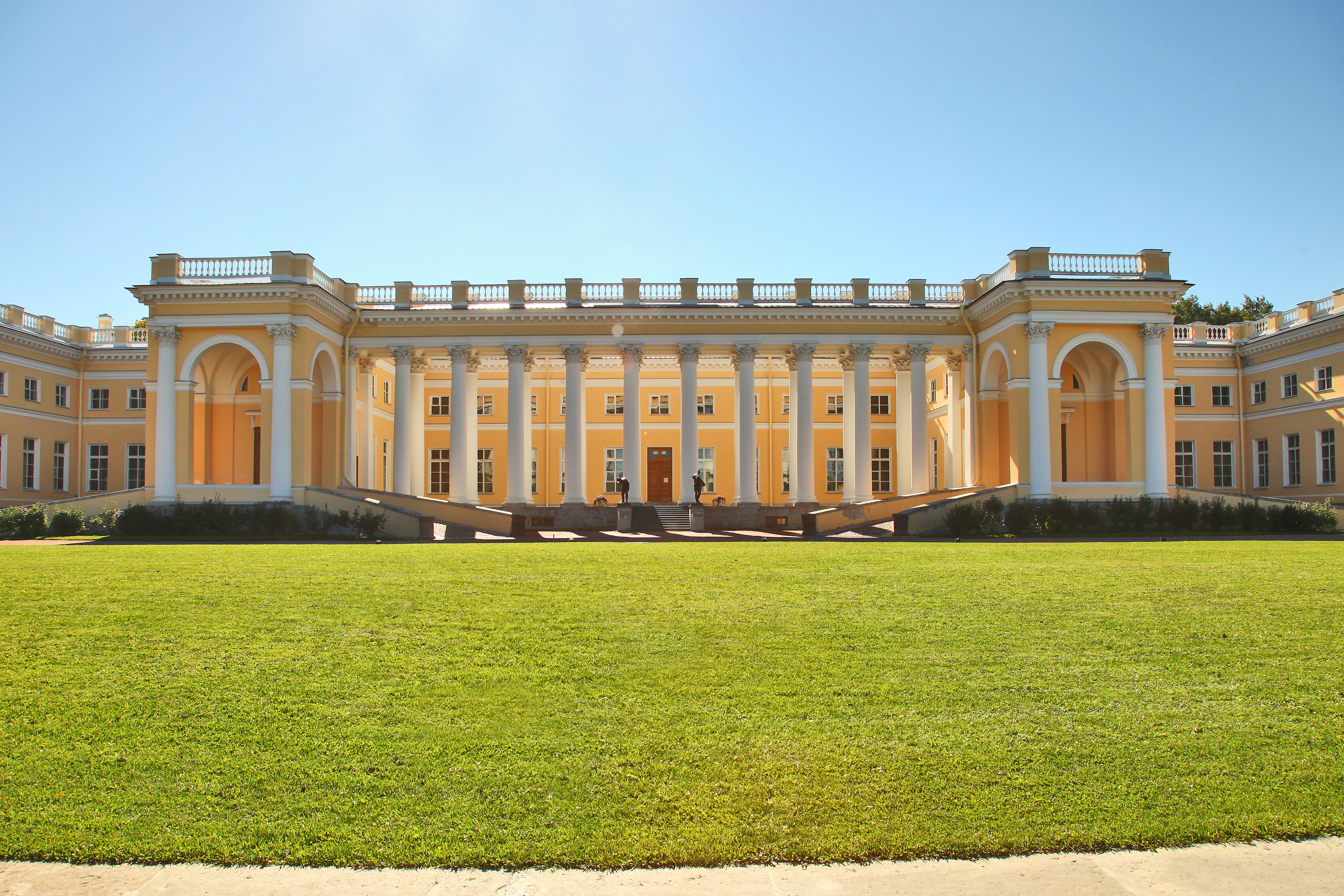 Государственный художественно-архитектурный дворцово-парковый музей-заповедник 'Царское Село': Пушкин, Пушкинский район, Санкт-Петербург This image is related to the protected area of Russia number 7800008